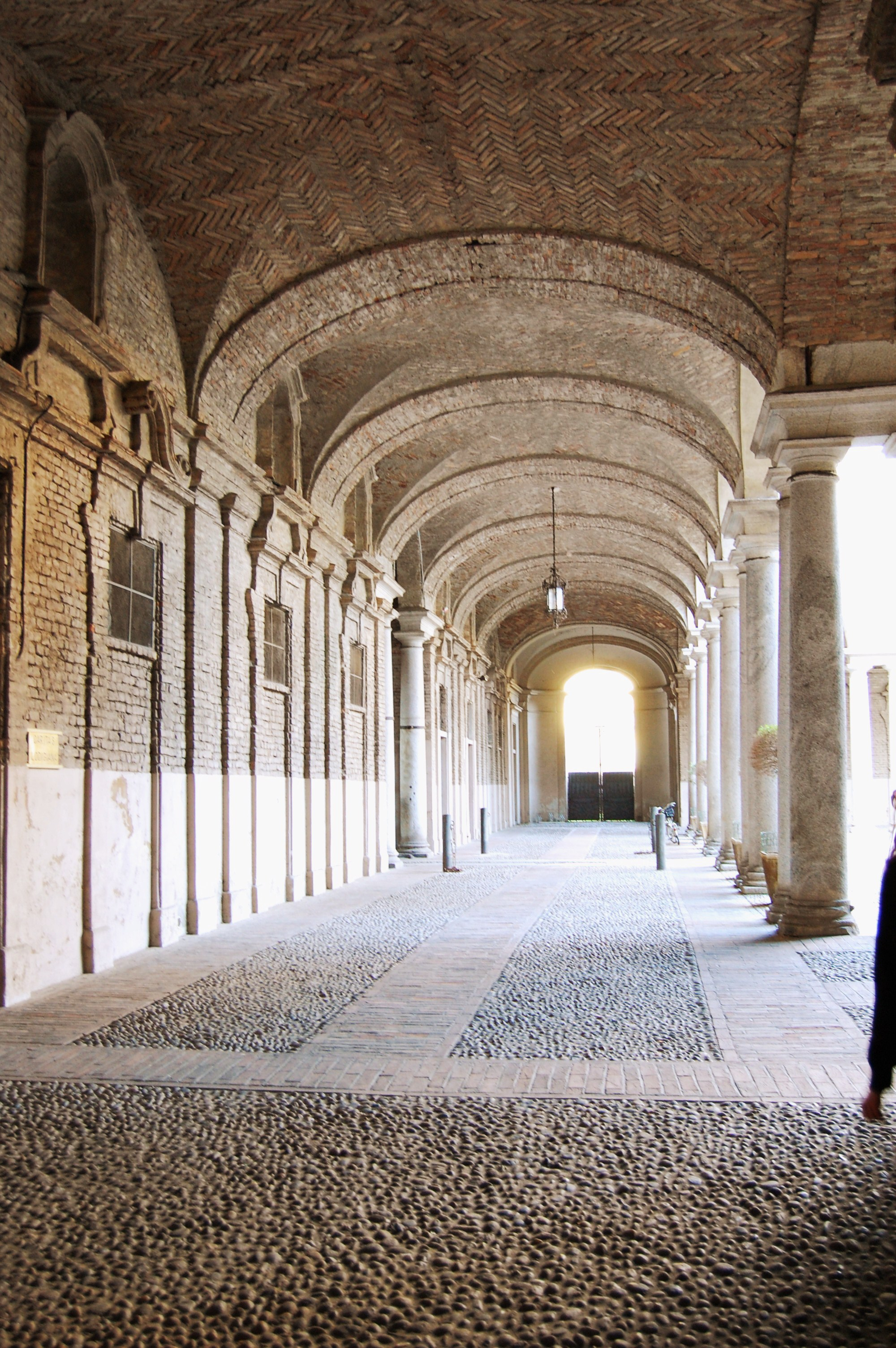 Portico interno del Palazzo Vescovile di Lodi